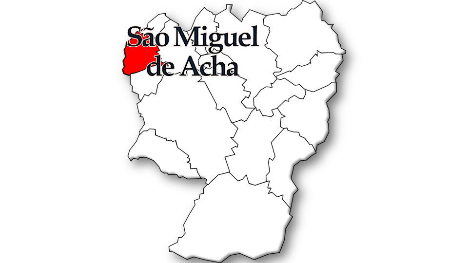 População